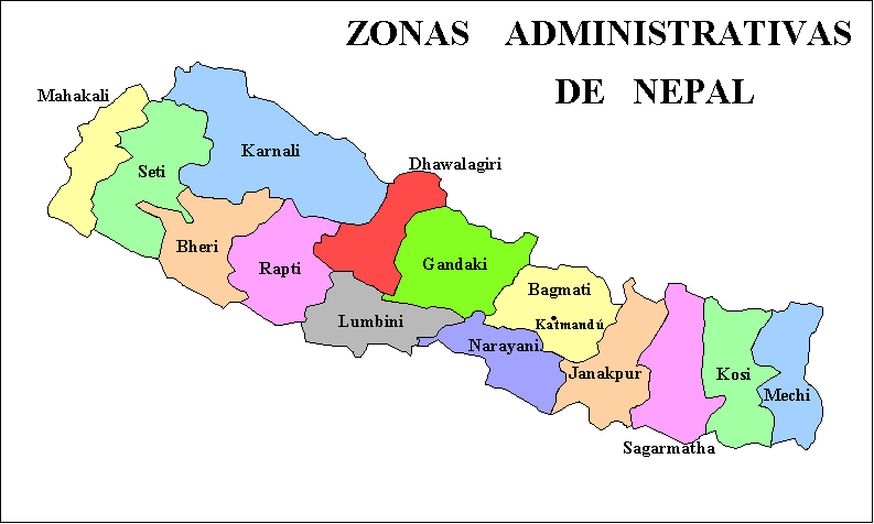 Mapa político de Nepal